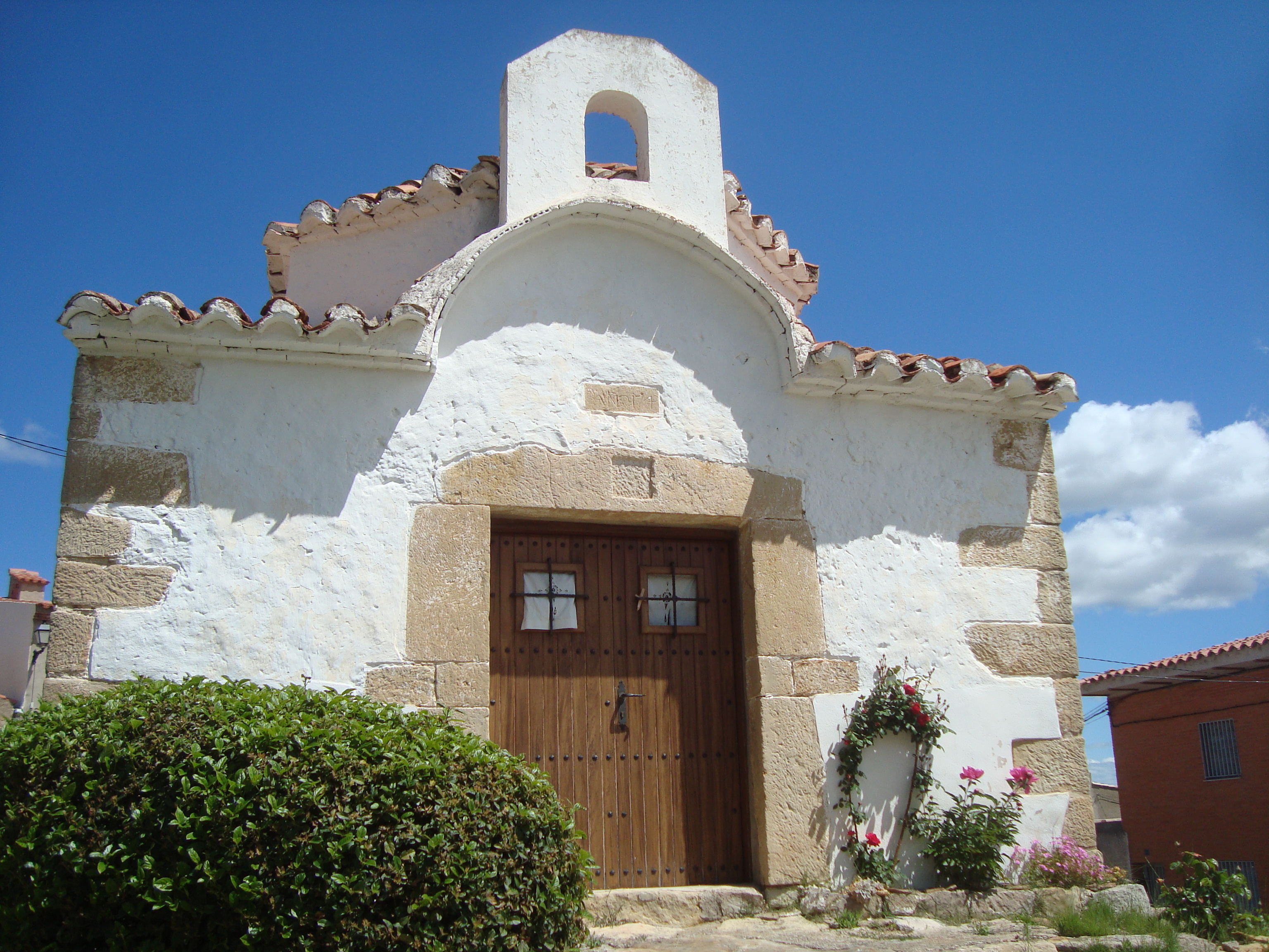 Ermita del Calvari (Benafigos) 04.025-003.